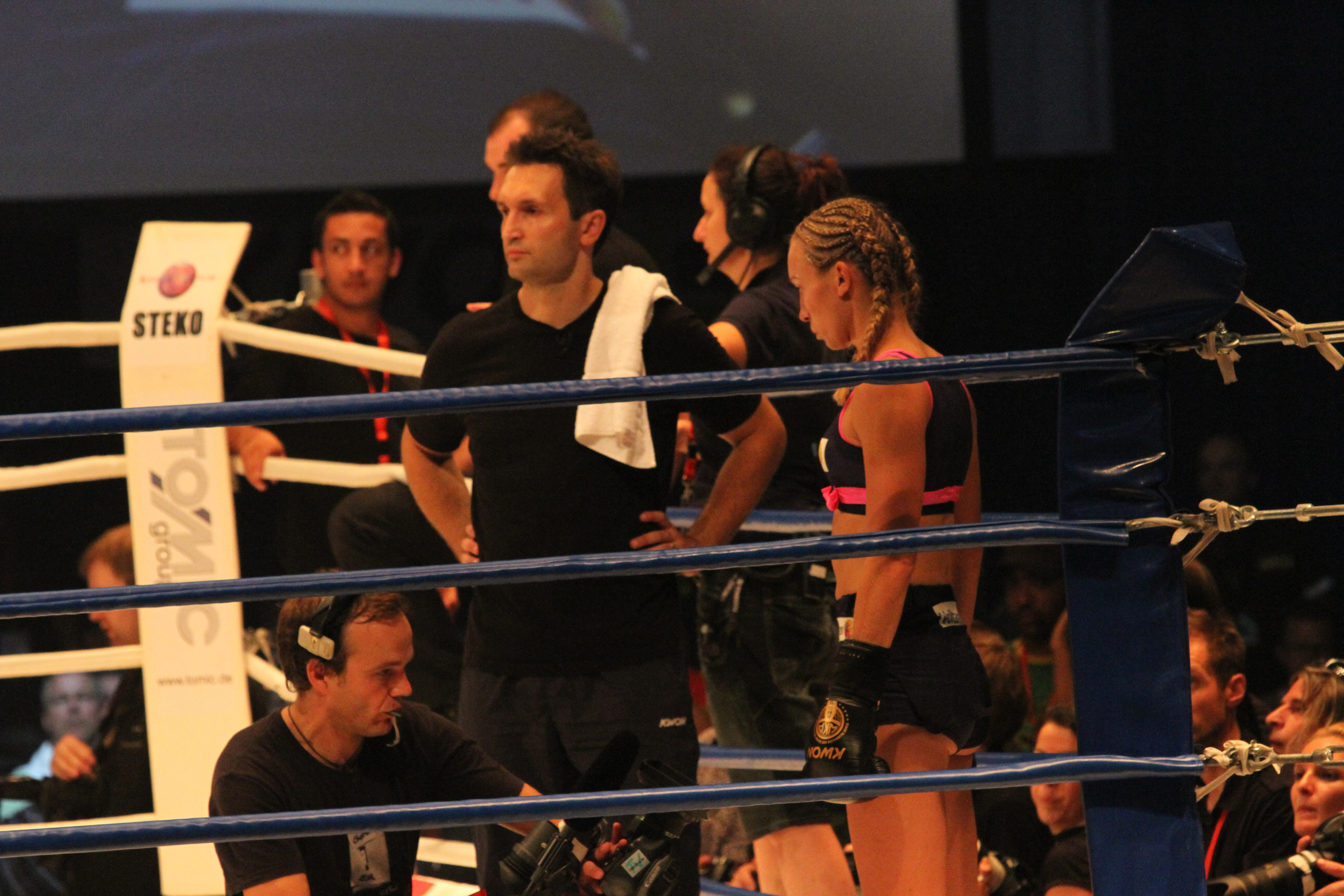 Mladen Steko und Christine Theiss